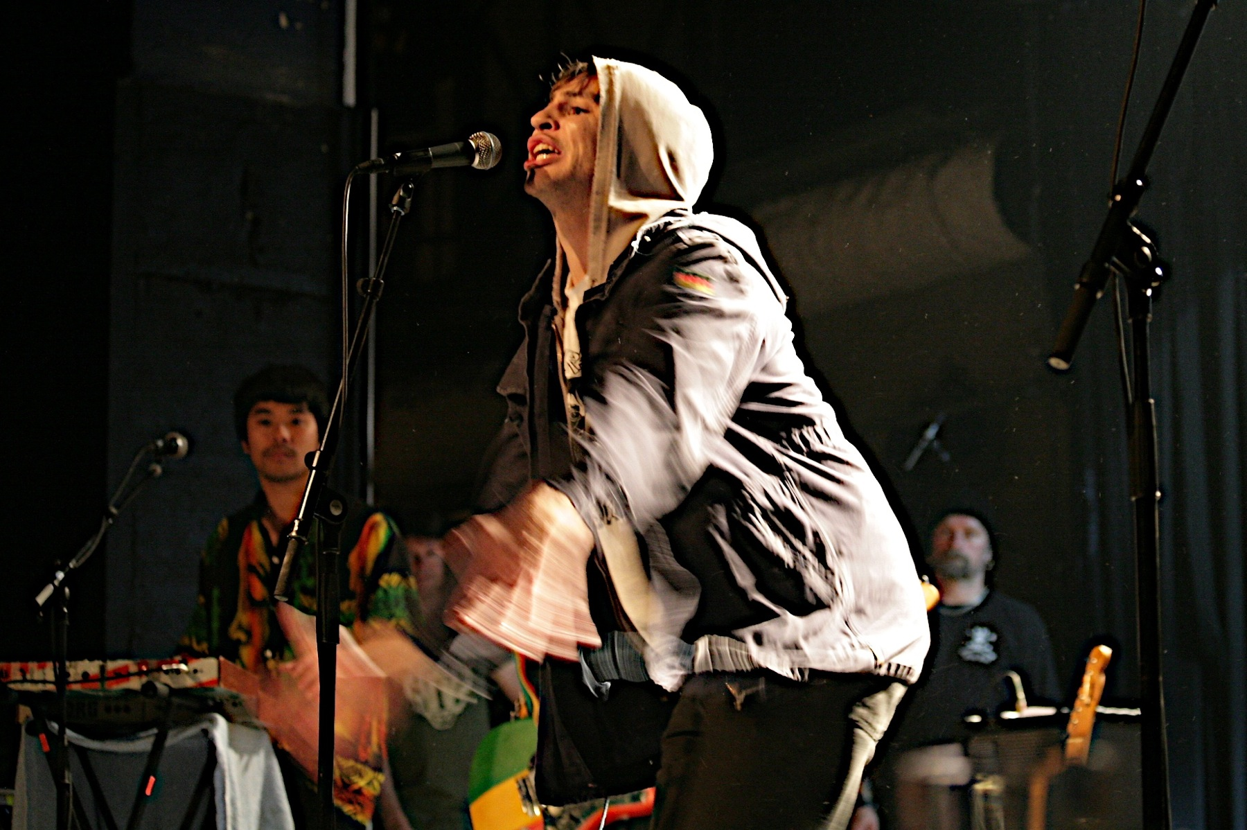 Fjorden Baby!